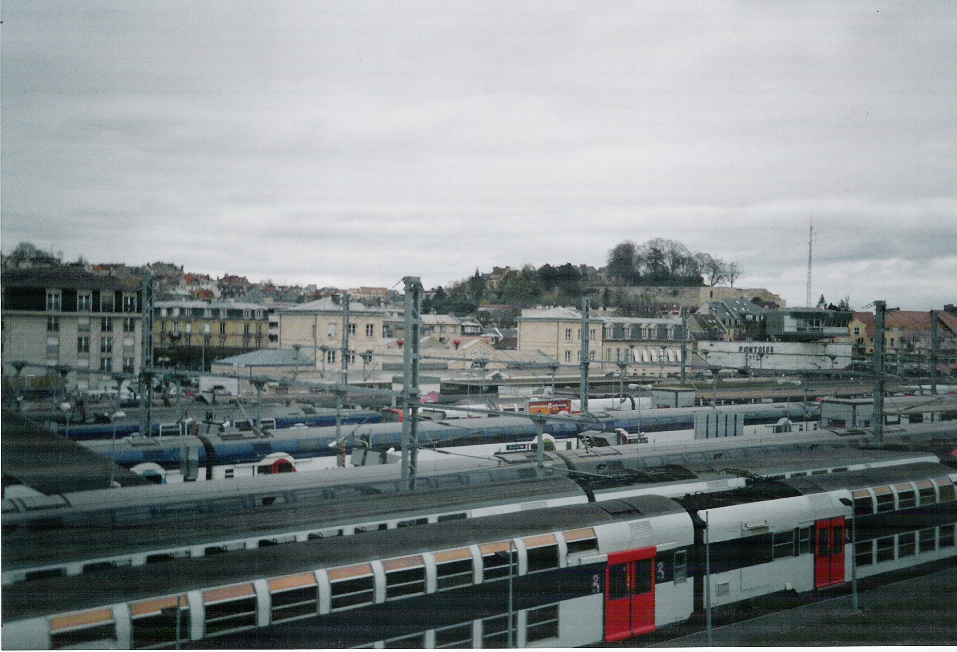 Vue générale de la gare de Pontoise prise depuis la gare routière Canrobert (Val d'Oise - France). Il s'agit de la numérisation d'une photographie argentique personnelle par Cyrflo2000 (Cyril). De bas en haut, on aperçoit les 2 premières voies de garage des RER C, puis les trains allant vers Paris Saint-Lazare et Paris Nord. A mi-hauteur à droite, on remarque le Mont Bélien et les remparts.